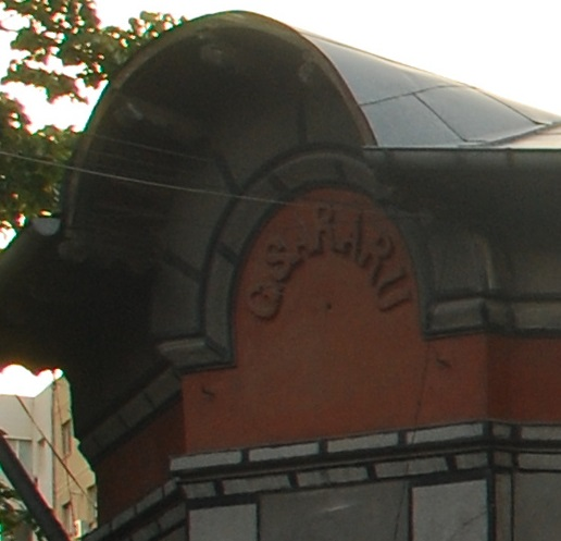 Frontispiciul casei Săraru din Buzău, România